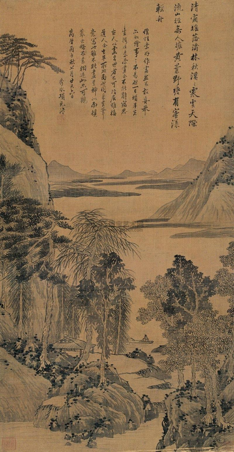 明代 水墨纸本 立轴 1576年 68*36 com